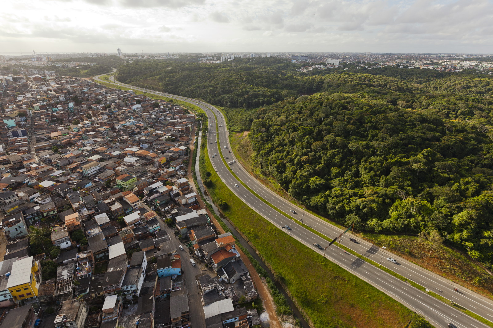 Vista aérea da Luís Eduardo Magalhães, em Salvador.